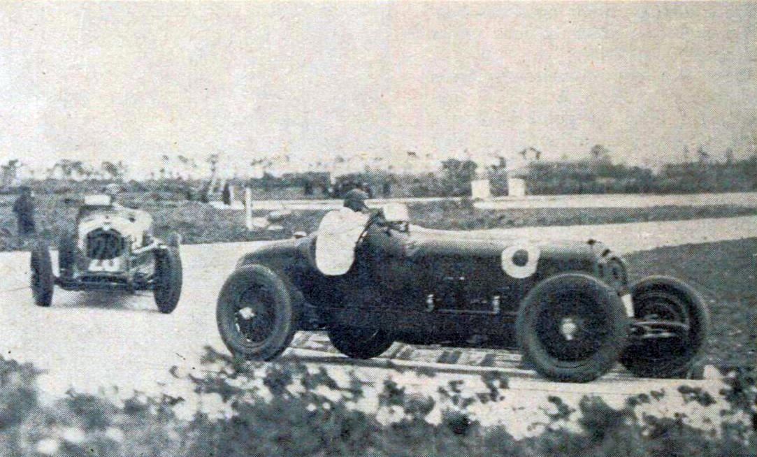 Tazio Nuvolari, vainqueur du Grand Prix de Tunisie 1933 sur Alfa Romeo 8C 2600, à Carthage.